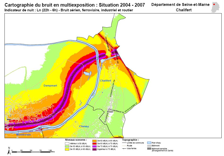 Carte de bruits multi-exposition Ln de la commune de Chalifert